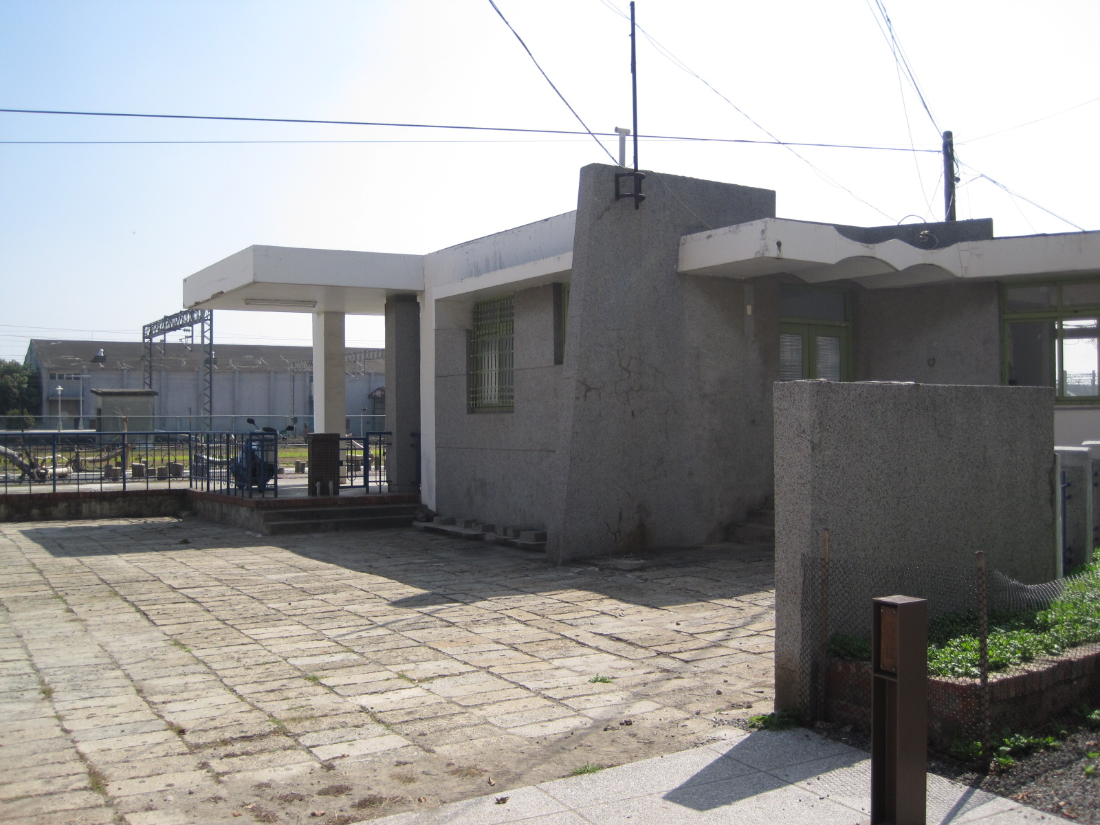 台糖新營車站